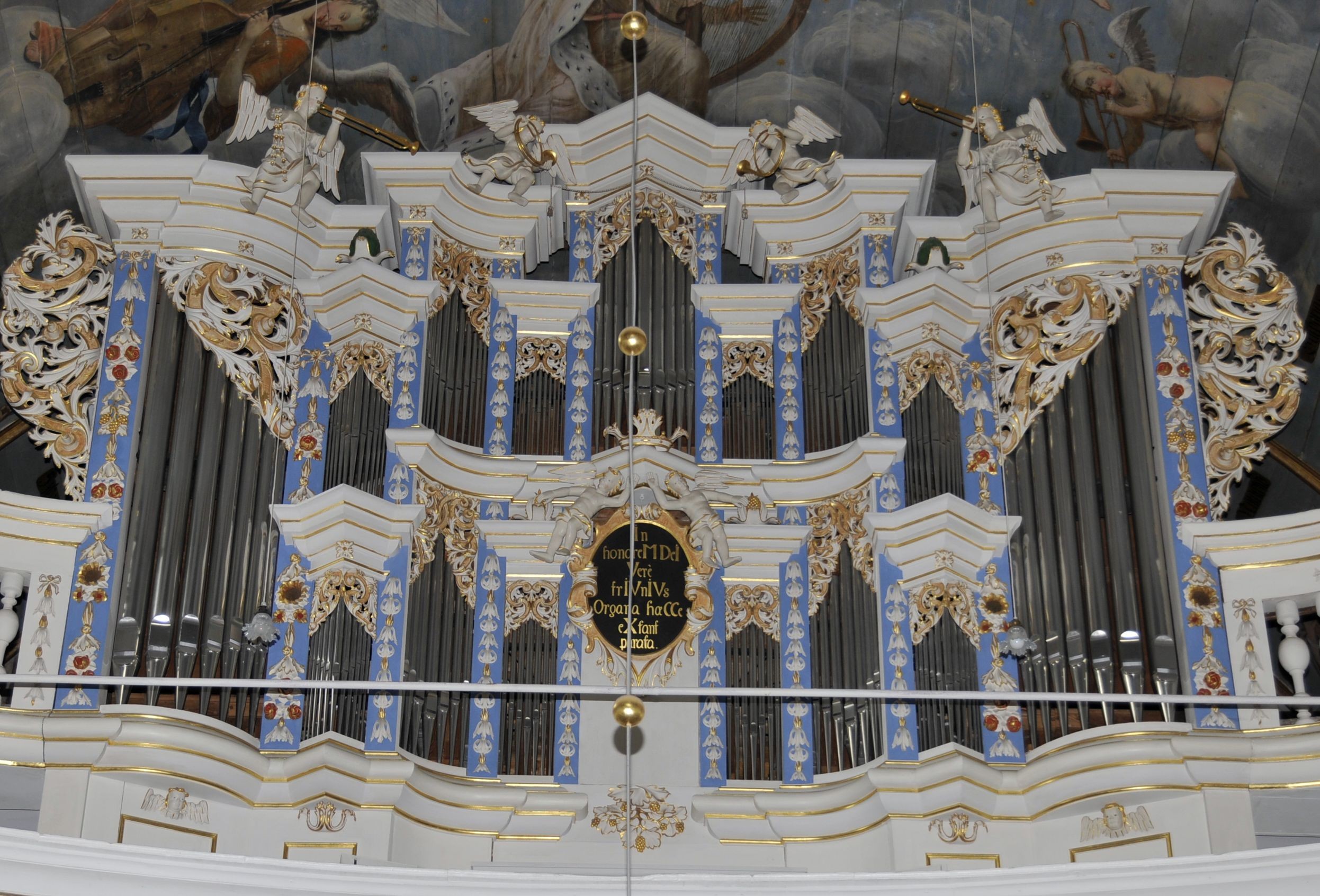 Orgel der Mühlberger Kirche